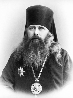 Епископ Гдовский Кирилл (Смирнов). Фотография. Нач. ХХ в. (РГИА)